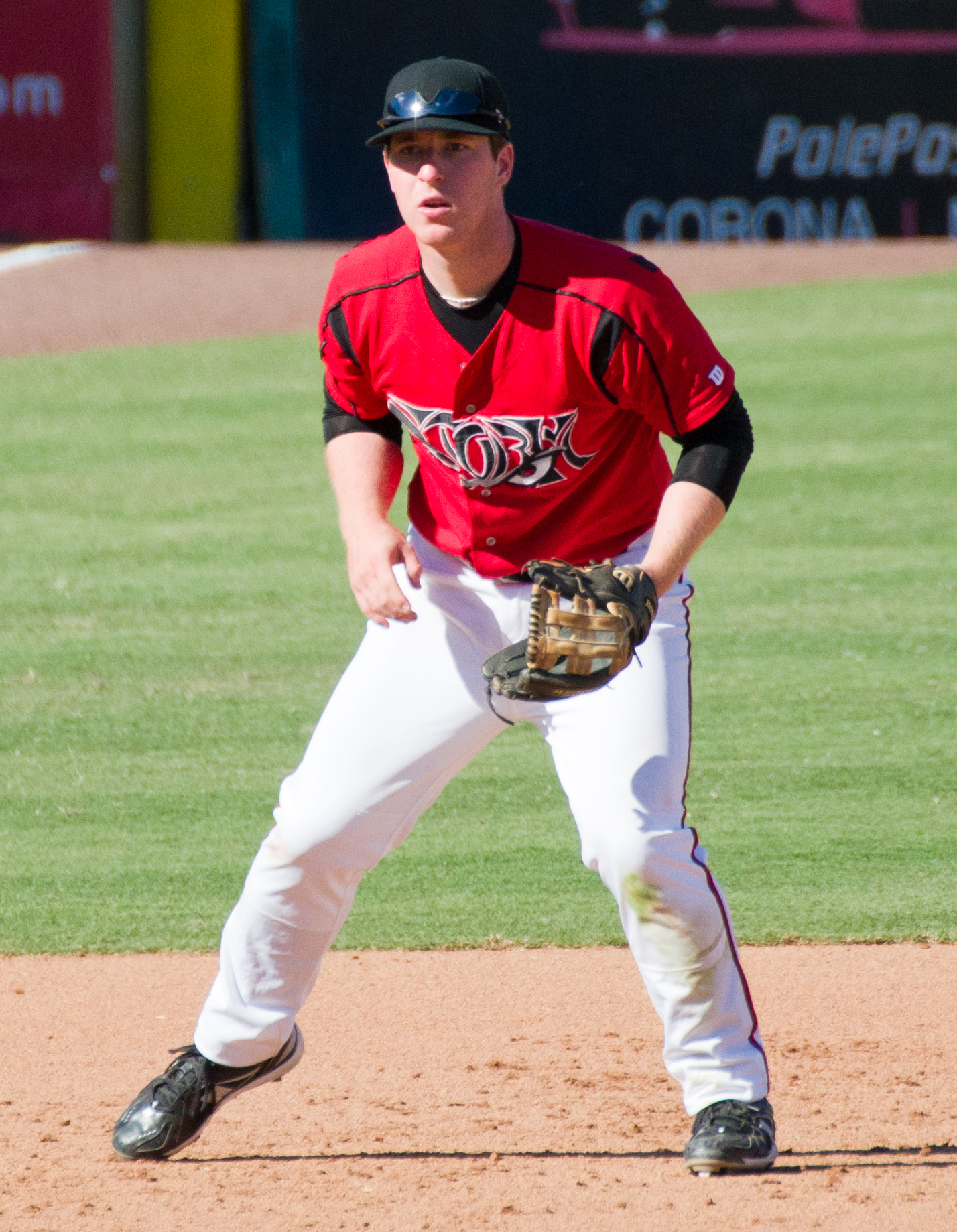 Jedd Gyorko